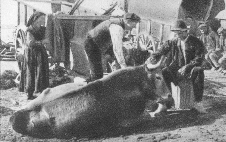 Romería de San Froilán - Castrillo de los Polvazares (León) - España Turística y Monumental / Cuarto álbum / Las Bellezas de Castilla / Región Leonesa - Cromo 50 x 70 Sepia